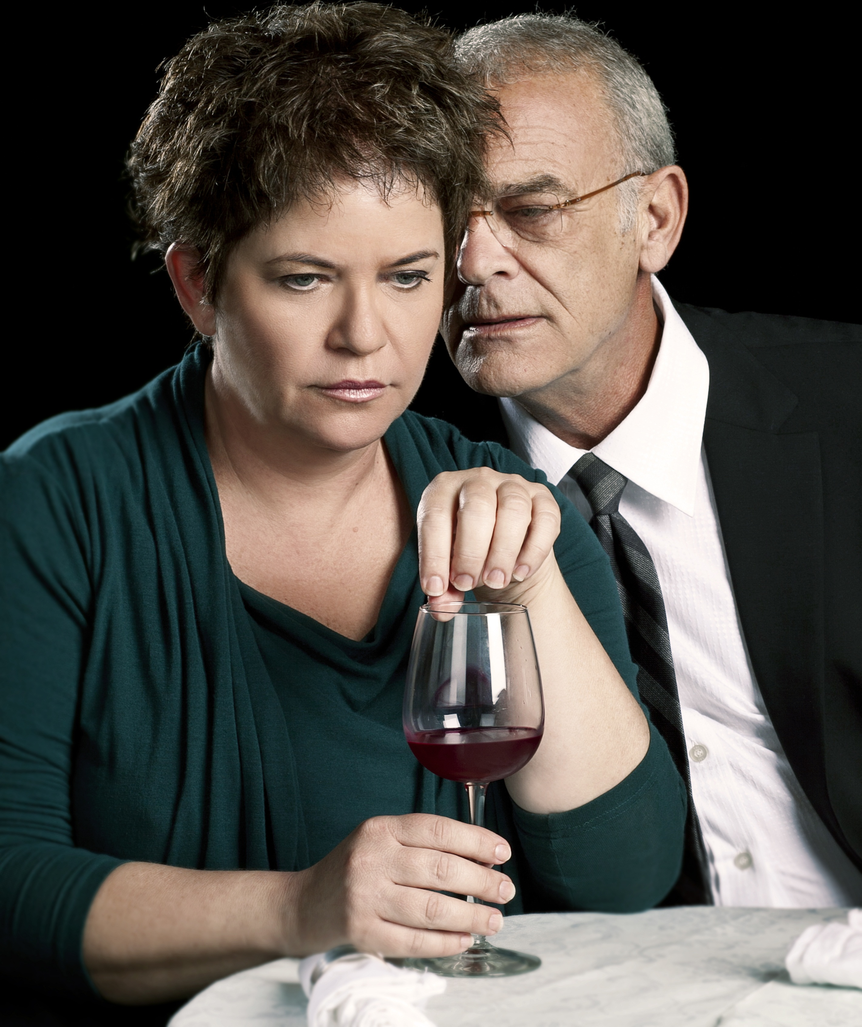 אורנה רוטברג ורפי תבור בקיר זכוכית צילום דניאל קמינסקי